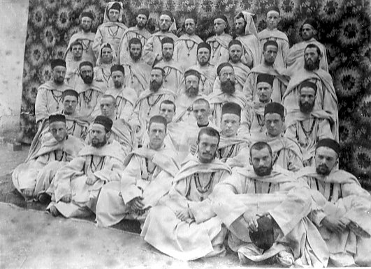 Pères blancs et novices à Maison-Carrée (Alger) en 1885.